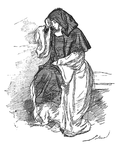 Sor Teodora de Aransis, personaje de "Un voluntario realista" de Galdós. Edición de la Imprenta y Litografía de La Guirnalda, 1878. Ilustración de Gómez Soler y Pellicer.